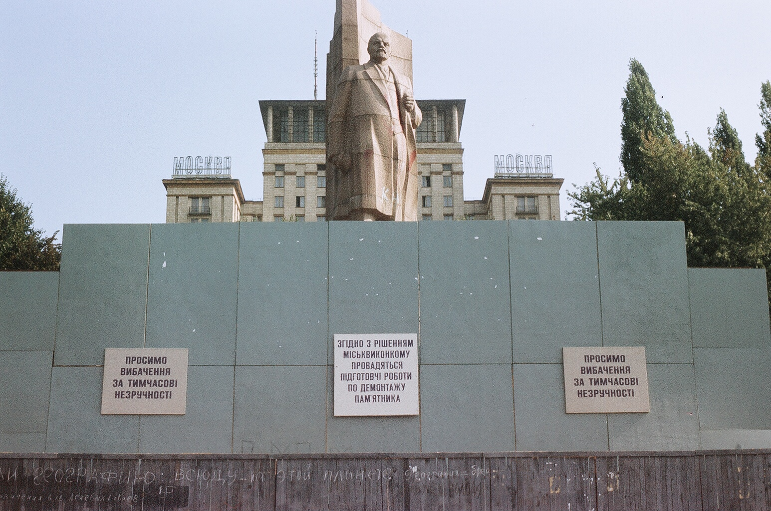 Демонтаж монументу Леніну на майдані Незалежності у Києві. 1991 рік